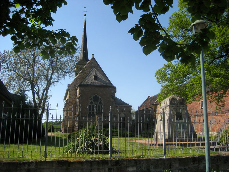 Die Dorfkirche in Kriechau bei Weißenfels (einschiffiger neugotischer Bruchsteinbau mit schlankem, quadratischem Turm und Spitzhelm). Rechts davor ein Kriegerdenkmal.